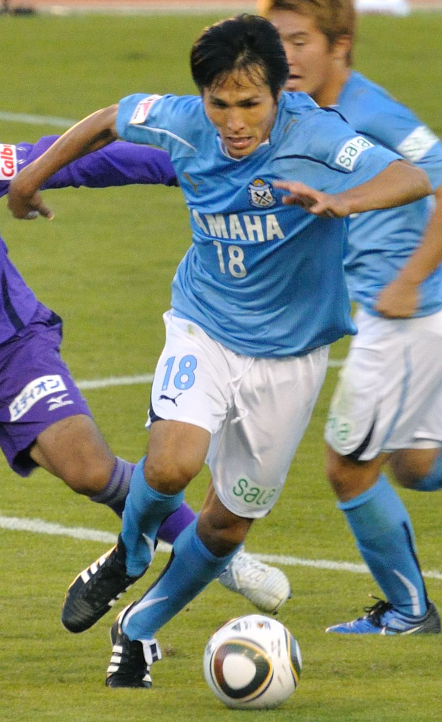 Ryoichi Maeda - 2010 Yamazaki-Nabisco Cup Final